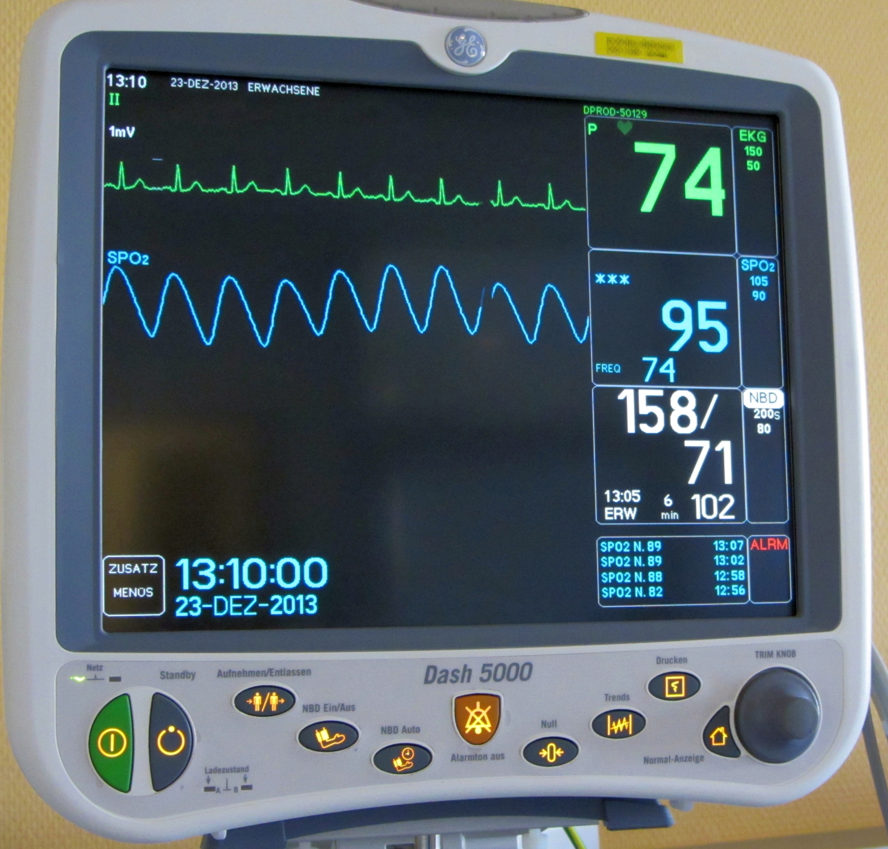 Medizinischer Multifunktionsmonitor Dash 5000